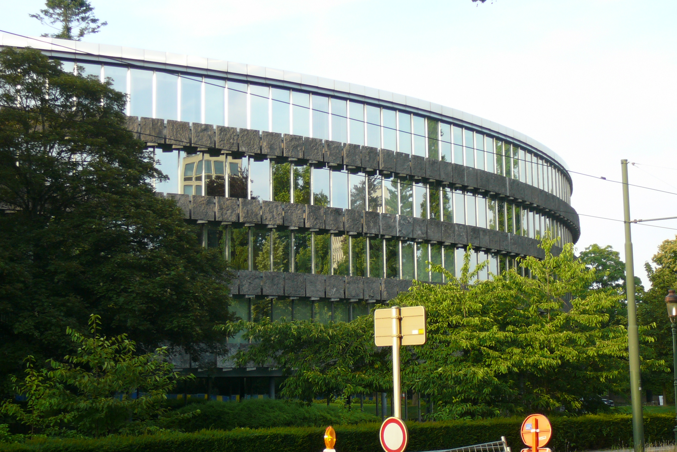 Le Glaverbel Building, ancien siège social de Glaverbel (devenu AGC Glass Europe), chaussée de La Hulpe, à Watermael-Boitsfort, en Région de Bruxelles-Capitale, Belgique, conçu par Renaat Braem, Pierre Guillissen, André Jacqmain et Victor Mulpas (1964)